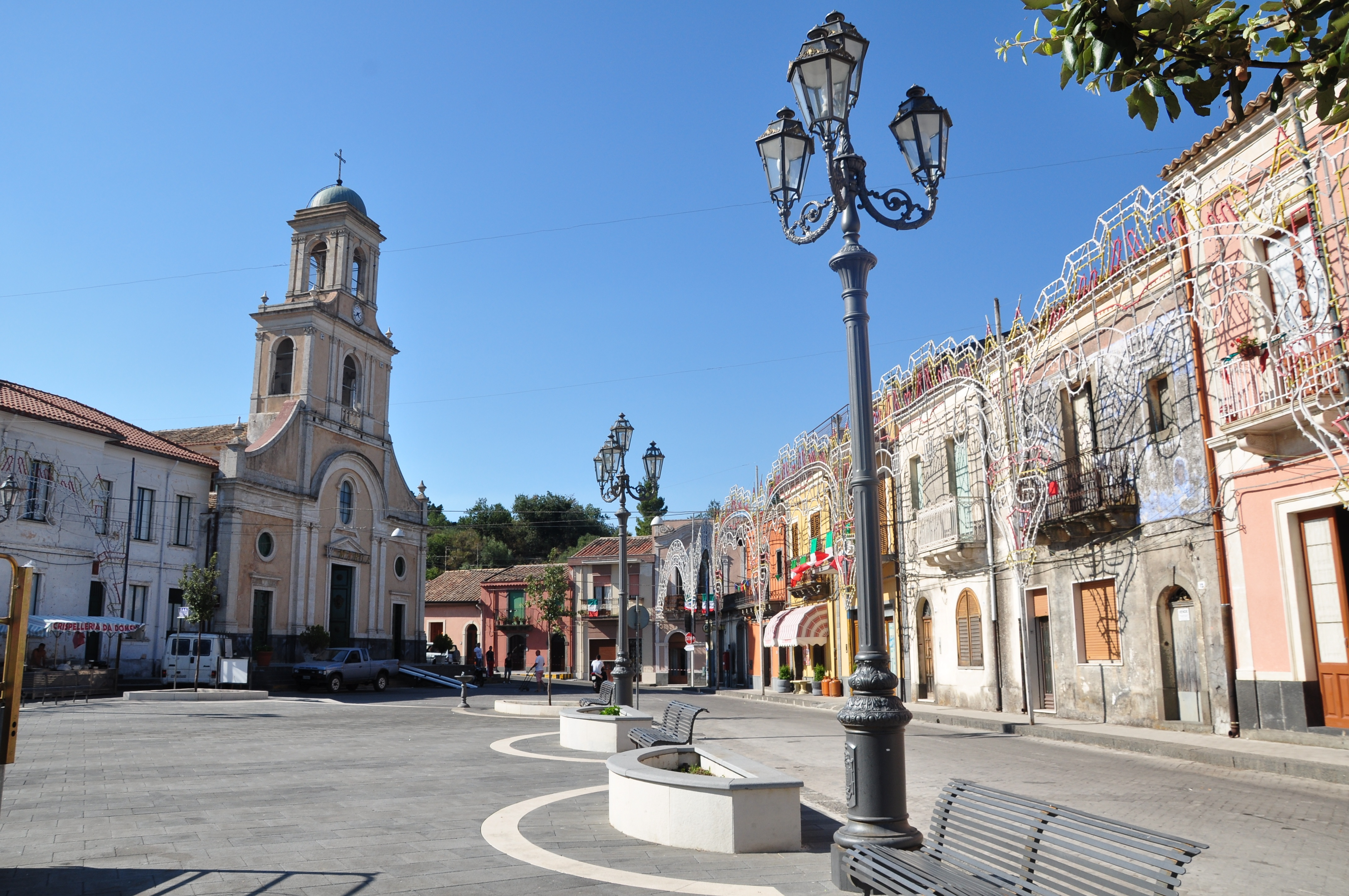 Piazza Maria SS. delle Grazie nella frazione di Presa (Piedimonte Etneo)